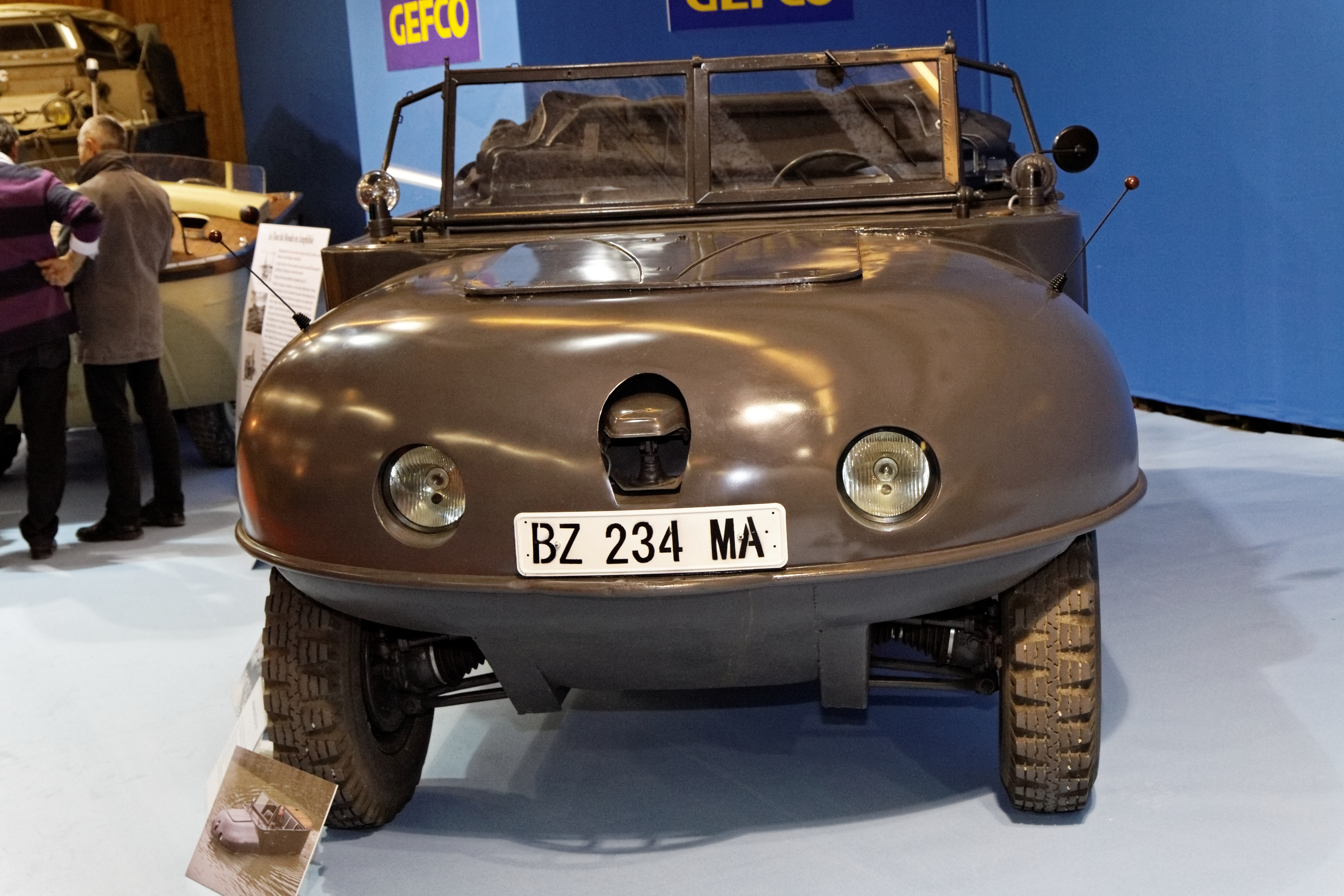 La Trippel type SG6 38